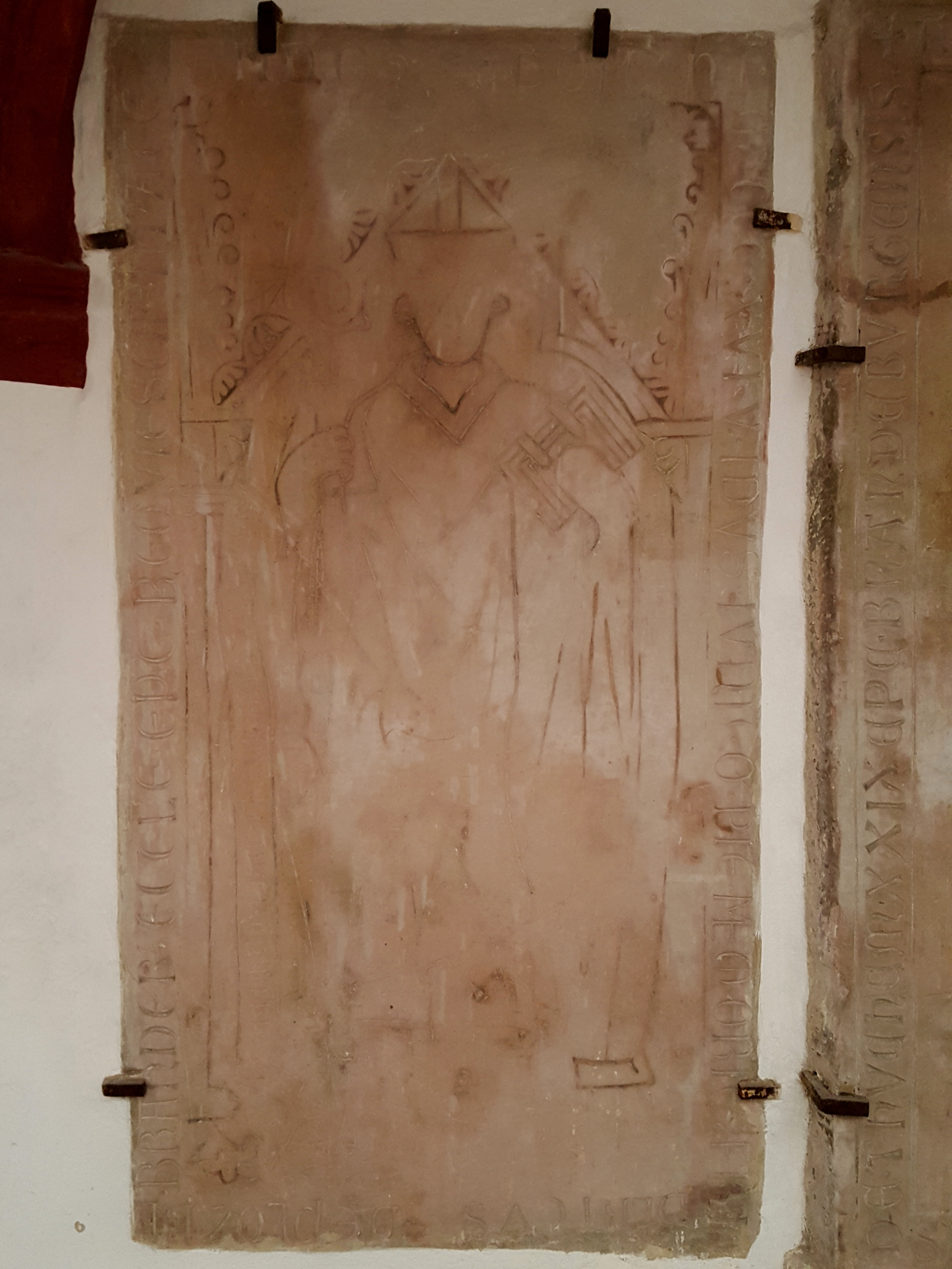 Grabplatte, Bischof Friedrich von Plötzke, Dom zu Brandenburg, Künstler unbekannt